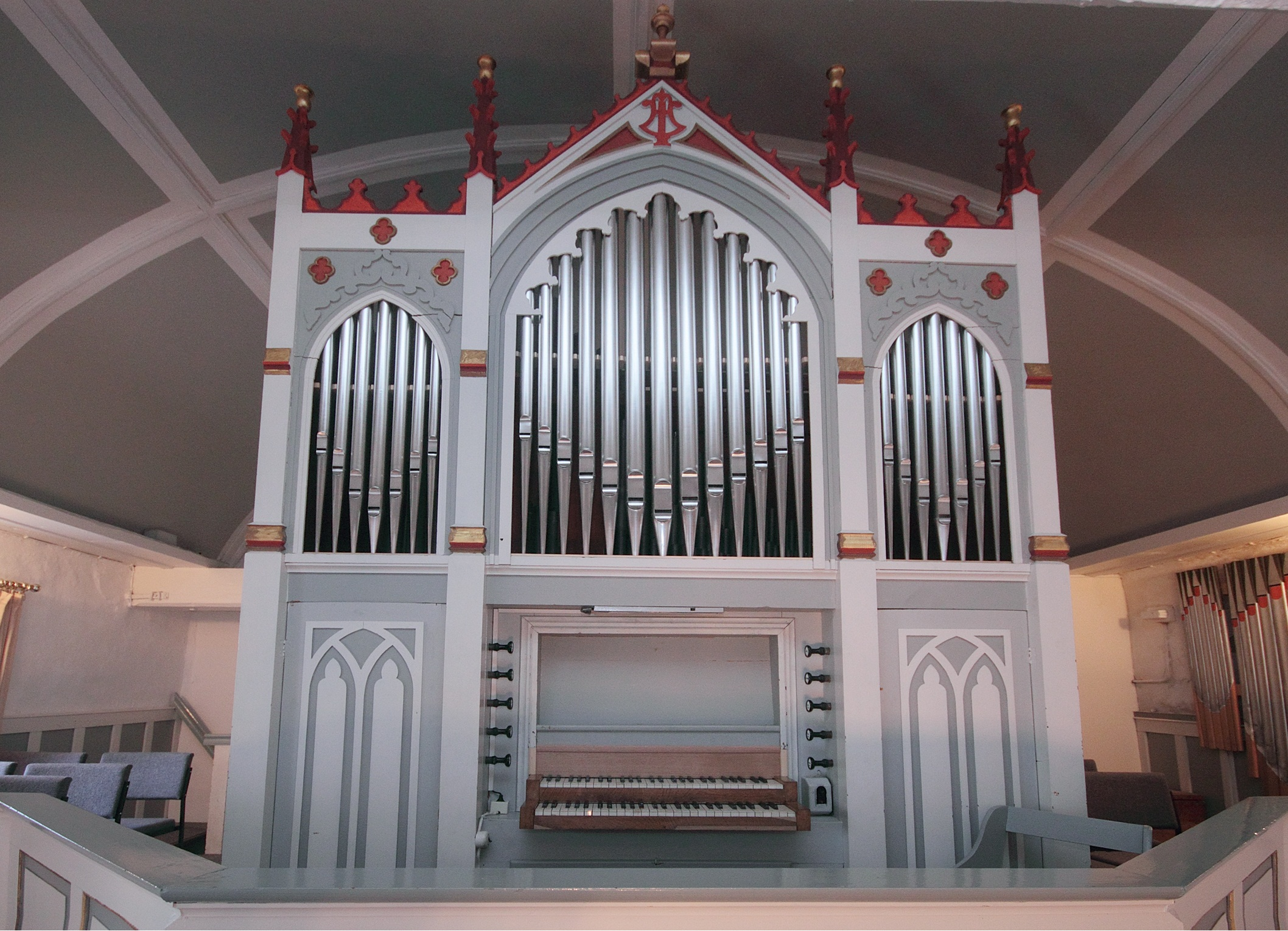 Orgel in Cirkwehrum, Ostfriesland, Niedersachsen, Deutschland